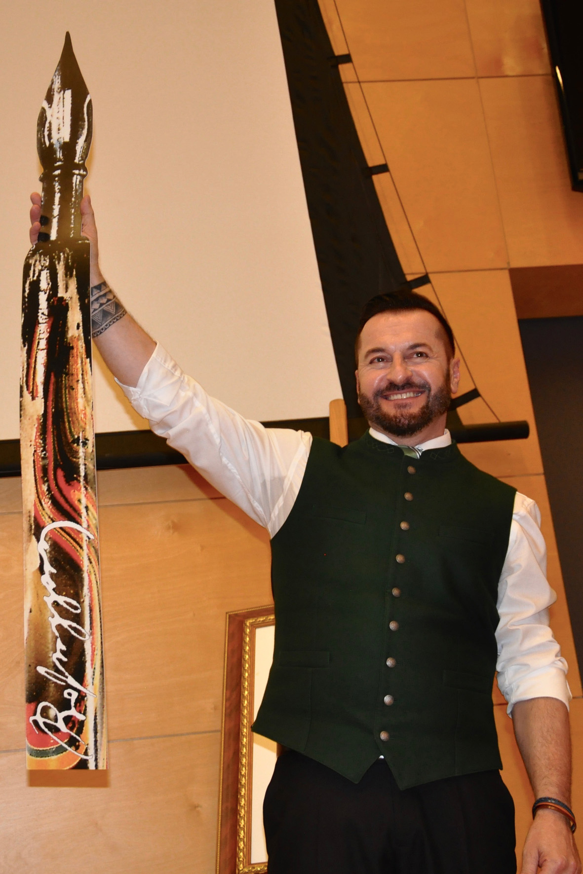 Bei der Wahl zum Leiter des Roseggerbund Waldheimat Krieglach.